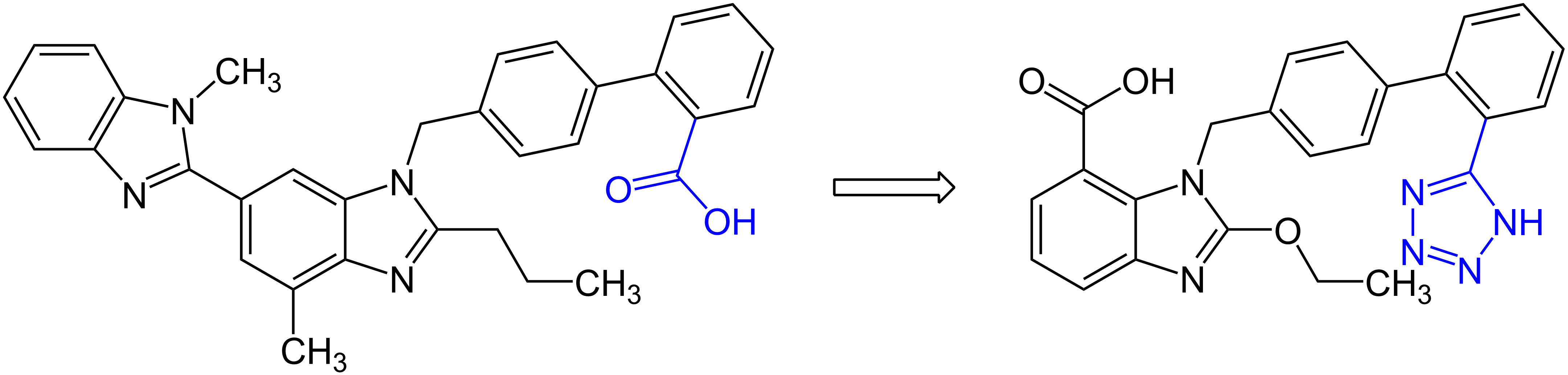 Bioisosterer Austausch der Carbonsäuregruppe durch Tetrazol: Telmisartan vs. Candesartan